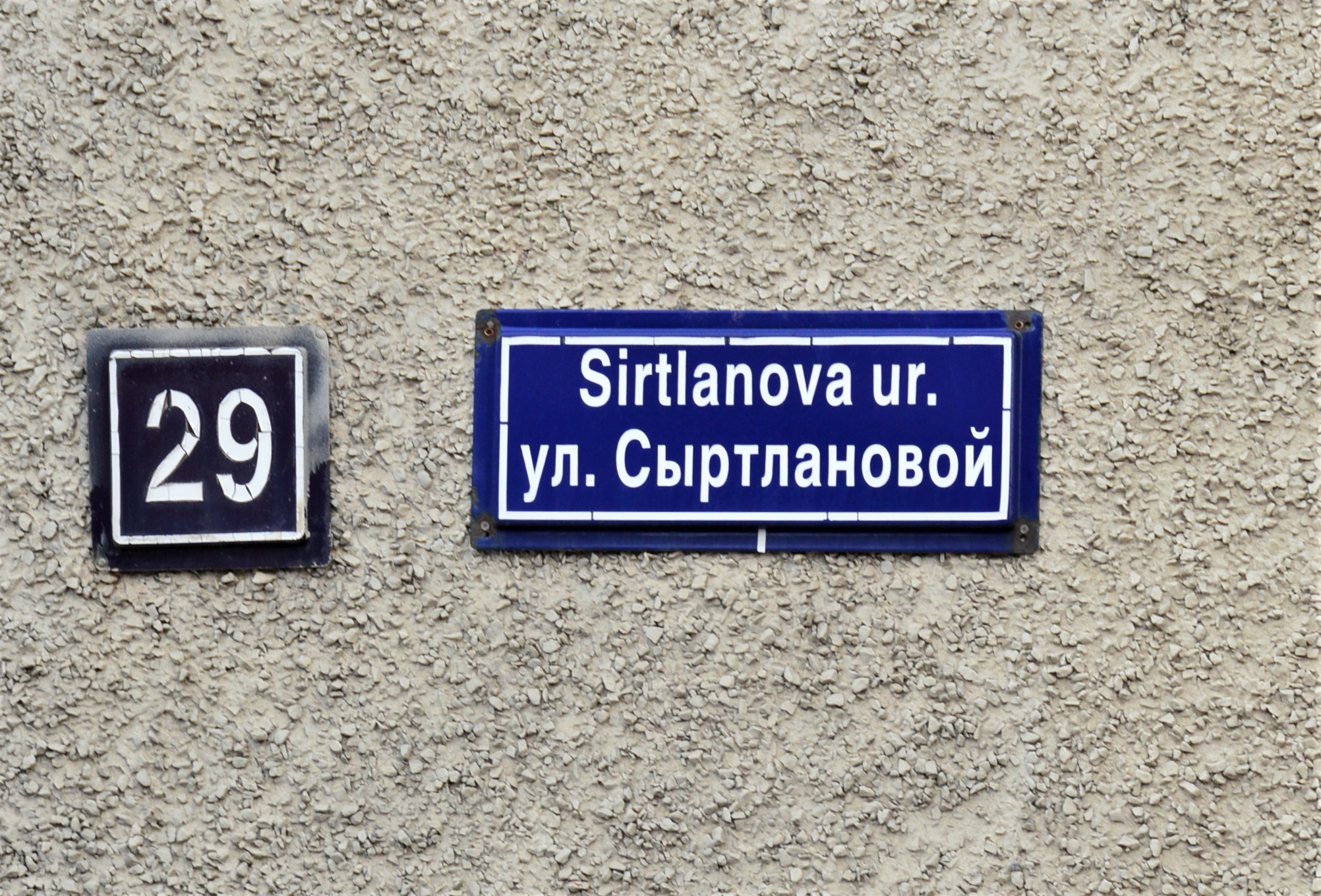 Казань. Горки. Табличка на доме: ул. Сыртлановой, 29.